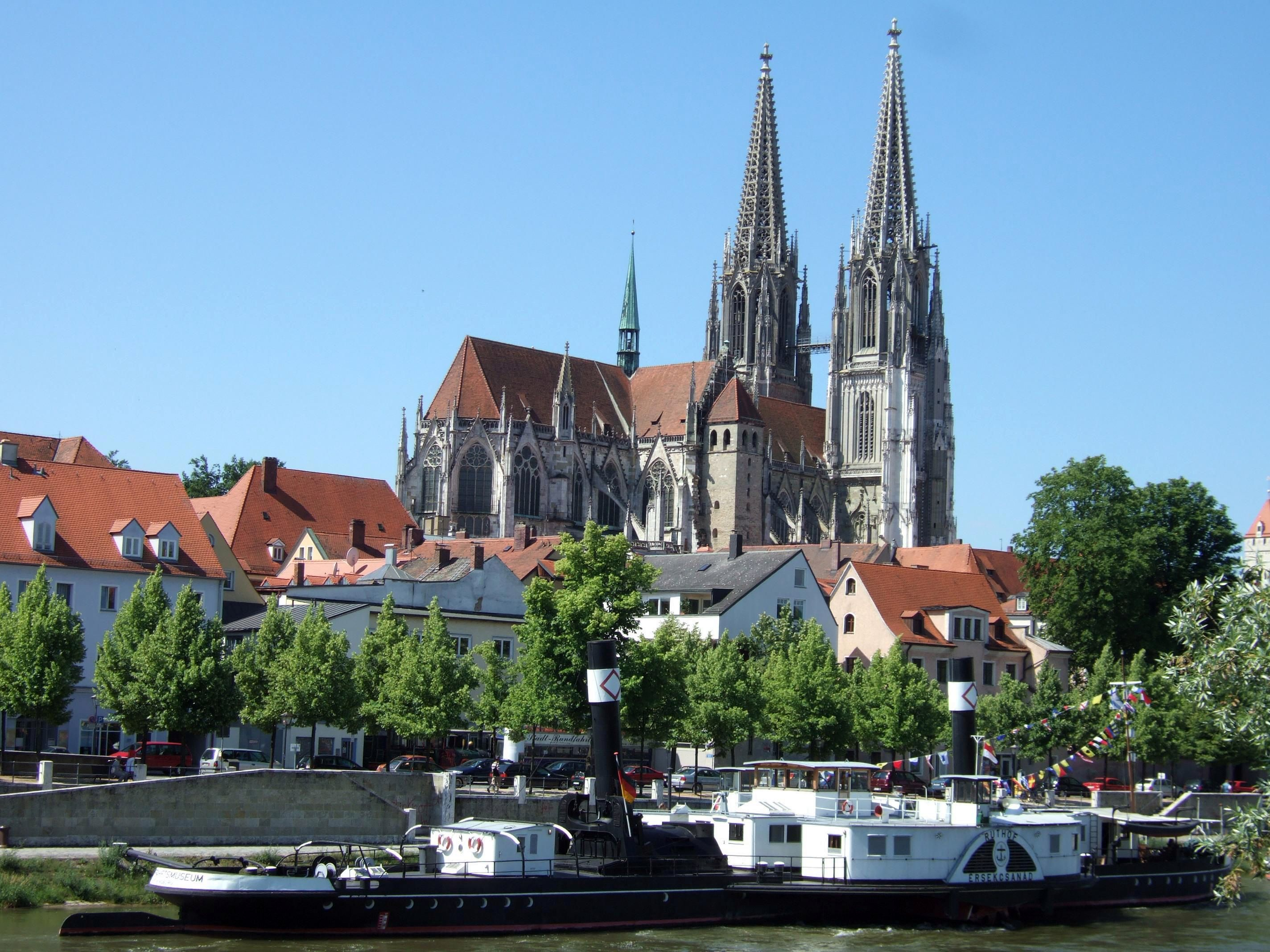 Blick von Norden auf Dom St. Peter zu Regensburg mit Donau und Schifffahrtsmuseum im Vordergrund